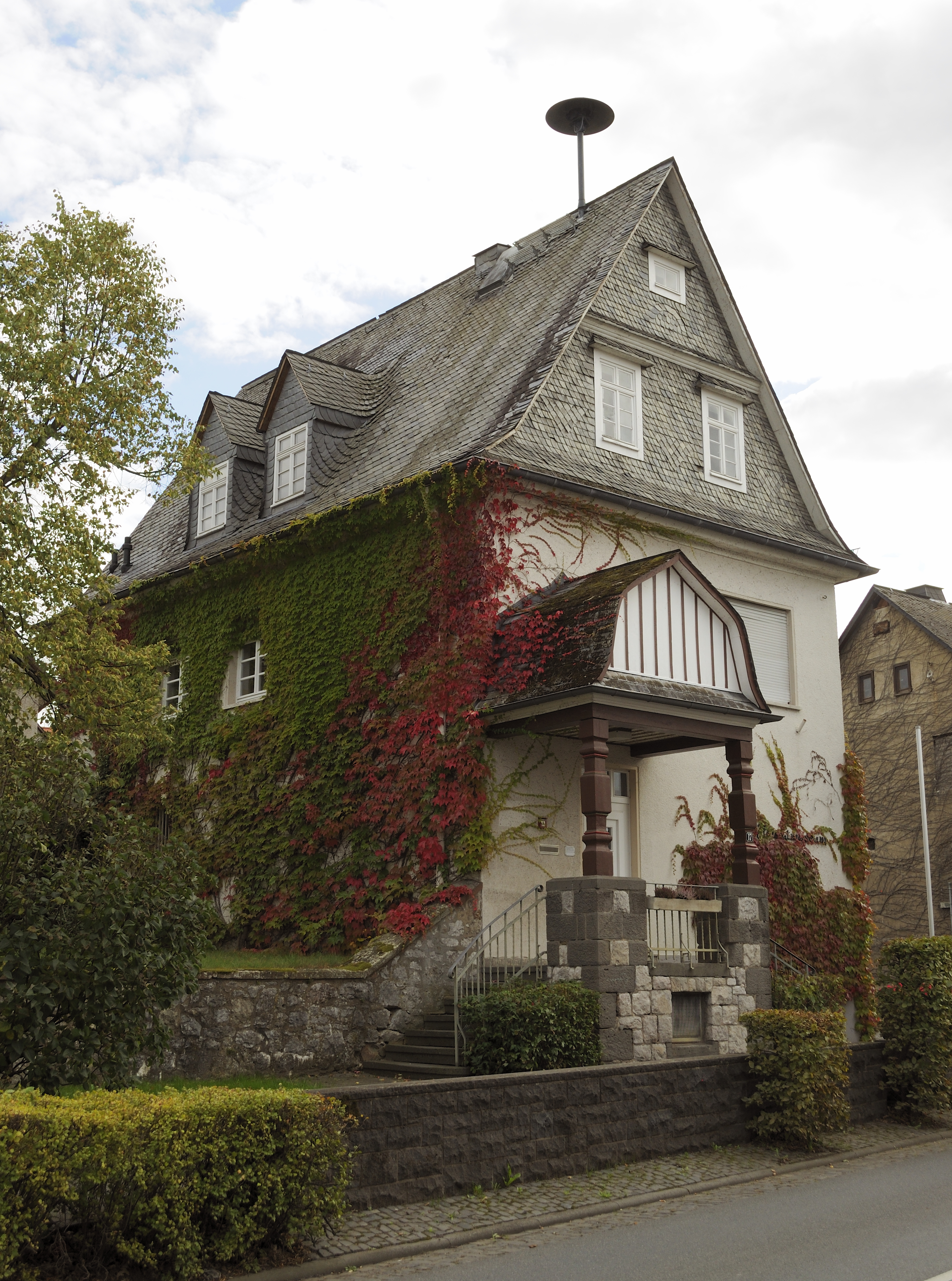 Dieses Foto entstand im Rahmen des Projekts Wiki Loves Monuments Mittelhessen, das aus dem Community-Projektbudget von Wikimedia Deutschland e. V. gefördert wurde.